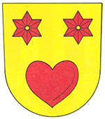 Hostim znak